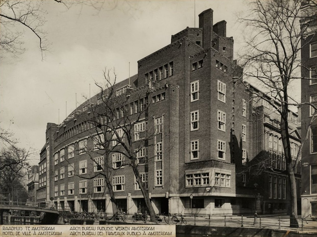 Raadhuis, Oude Zijds Voorburgwal, Amsterdam, 1926. Architect: N. Lansdorp. Collectie NAi | TENT_n68 URL van deze afbeelding: Meer foto's uit deze collectie kunt u bekijken in de Collectiedatabase van het NAi. Niet van alle gebouwen en interieurs zijn alle gegevens bekend. Heeft u meer informatie of weet u het adres van een gebouw? Laat dan een reactie achter (als u ingelogd bent bij Flickr) of stuur een mailtje naar: Al deze foto's zijn gemaakt in de eerste helft van de twintigste eeuw. Wij zijn benieuwd hoe deze gebouwen er vandaag de dag uitzien. Heeft u recente foto's van deze gebouwen of locaties, voeg ze dan toe als commentaar. U kunt een eigen Flickr-foto toevoegen door de URL ervan tussen vierkante haken in het commentaarveld te plakken. Als uw foto's een Creative Commons licentie hebben, nemen we ze bovendien graag op in de NAi Collectiedatabase. City Hall, Oude Zijds Voorburgwal, Amsterdam, 1926. Architect: N. Lansdorp. Photographer: unknown. NAI Collection | TENT_n68 Persistent URL: For more photographs from this collection, please visit the NAI Collection Database You can help us gain more knowledge on the content of our collection by adding a comment with information. If you do not wish to log in, you can write an e-mail to: All these pictures are taken in the first half of the twentieth century. We are curious to learn how these buildings look like today. If you have recently taken photographs of these buildings or locations, please add them to your comment. If you'd like to include a Flickr photo, simply copy and paste its URL between square brackets in the commentary-field. Photos with a Creative Commons licence may be used to illustrate the NAi Collection Database.